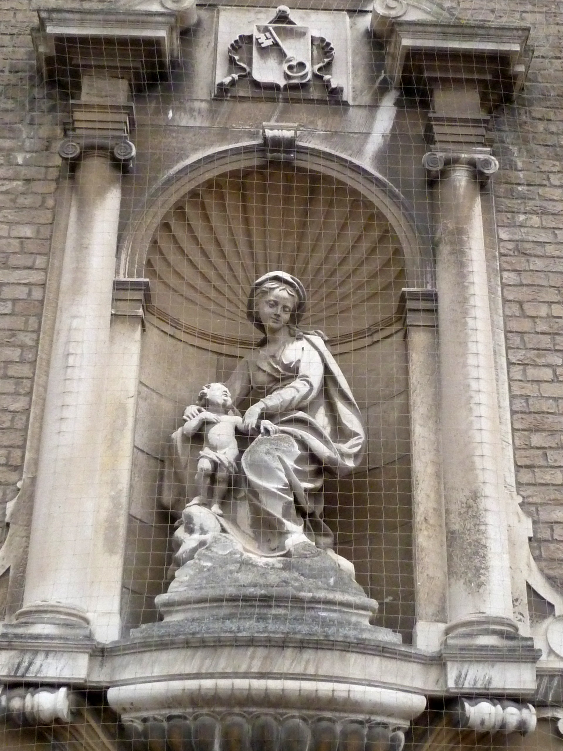 Onze-Lieve-Vrouw-van-Bijstand, een zittende madonna in de nis van de Kapucijnenkerk, Oostende; kopie van het madonnabeeld van Pieter Pepers (1730-1785)